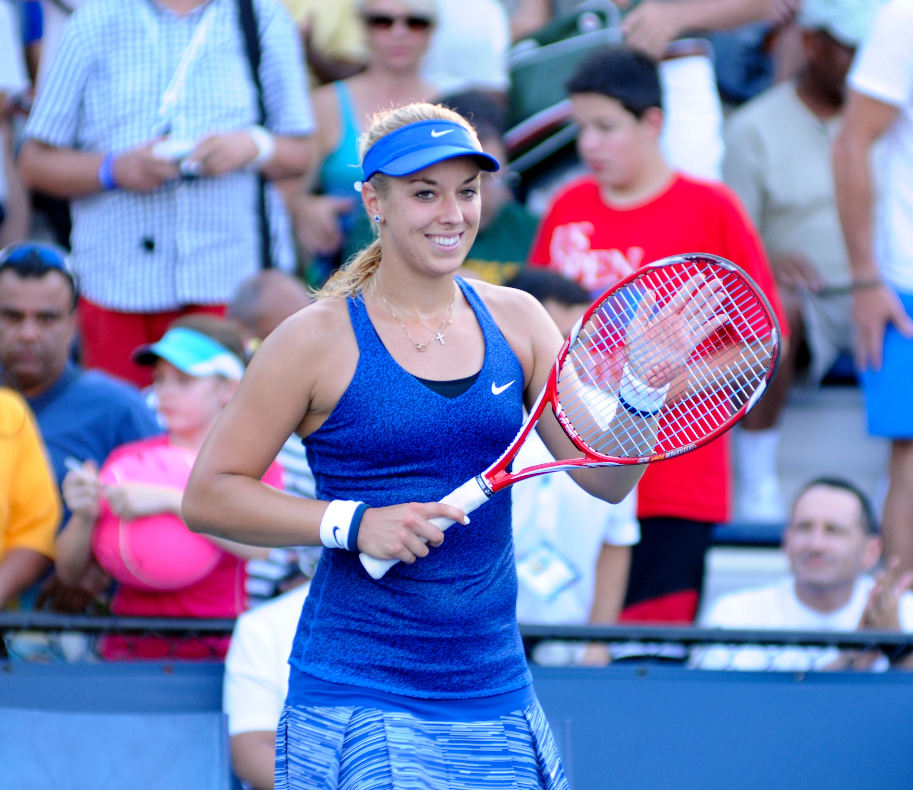 US Open 2014